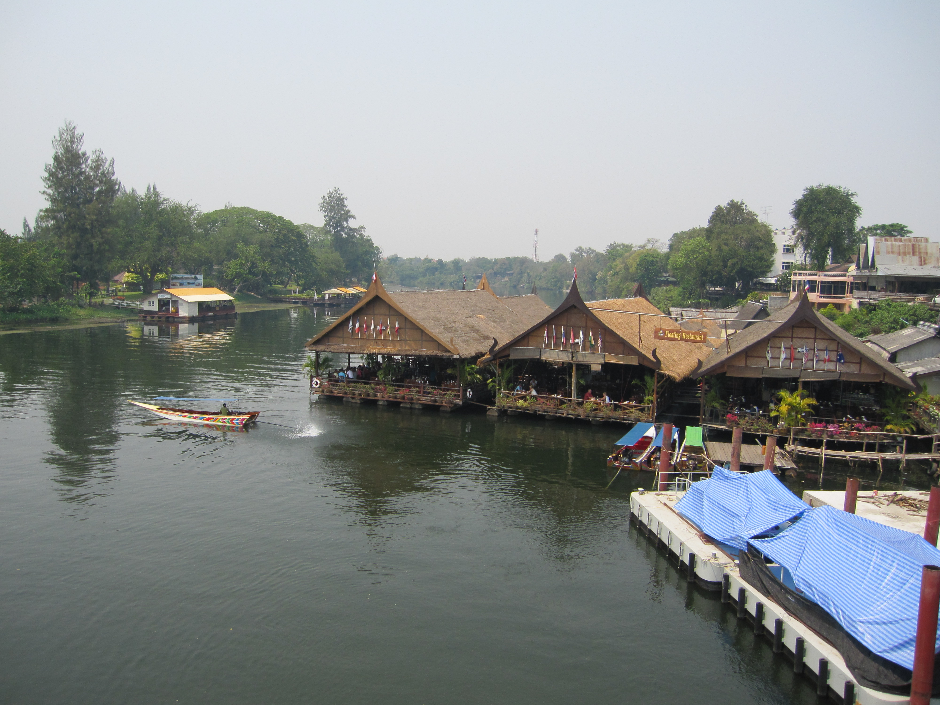 クウェー川鉄橋のそばにある水上レストラン